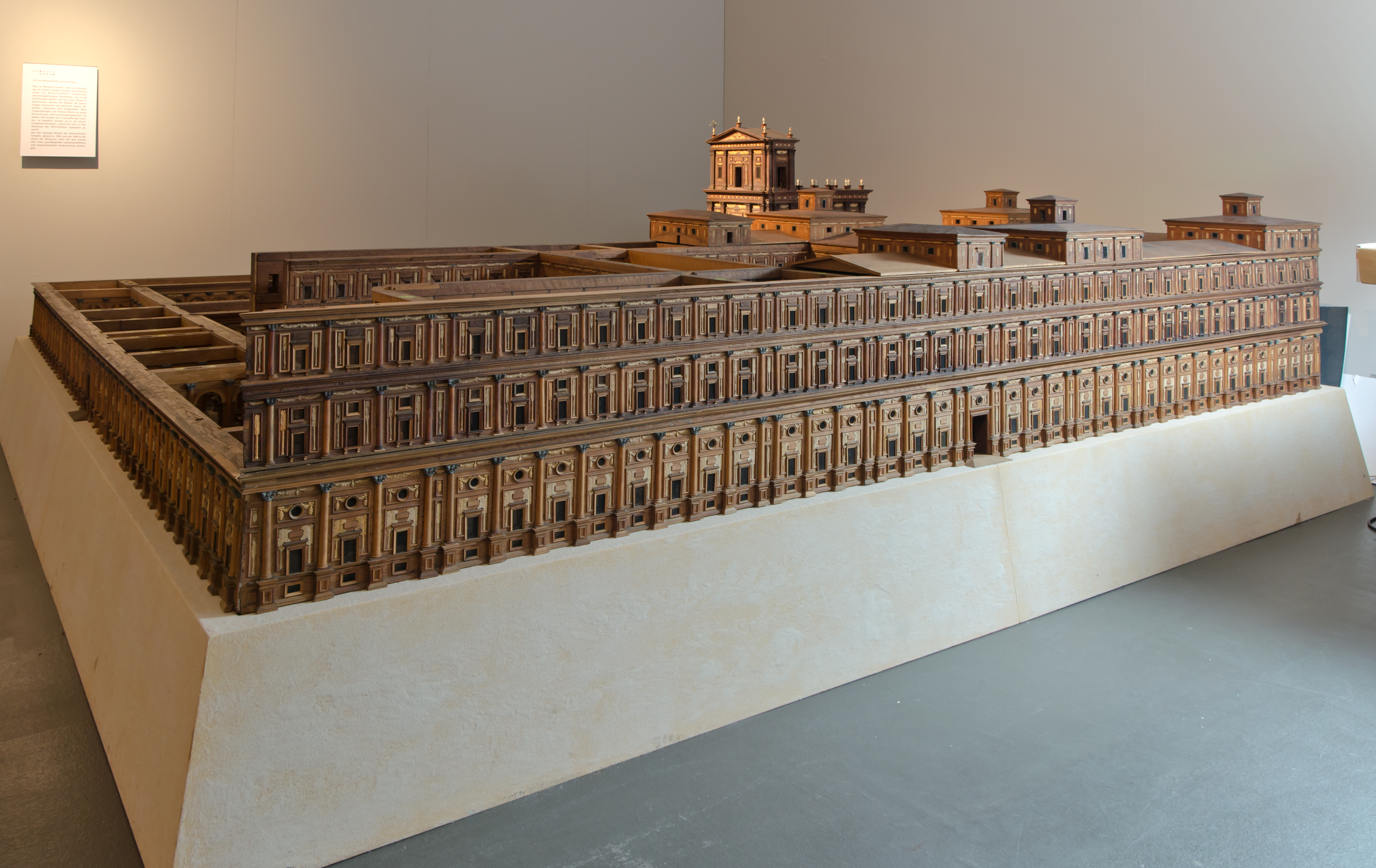 Hamburger Tempelmodell im Museum für Hamburgische Geschichte (teildemontierter Zustand im Mai 2013)